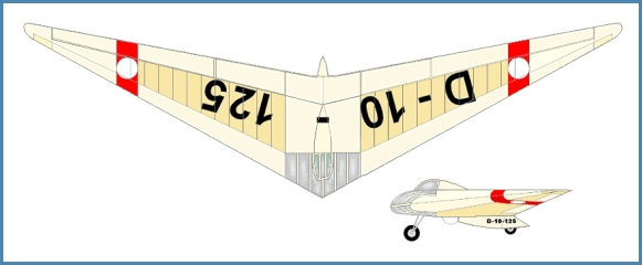 Horten 2L